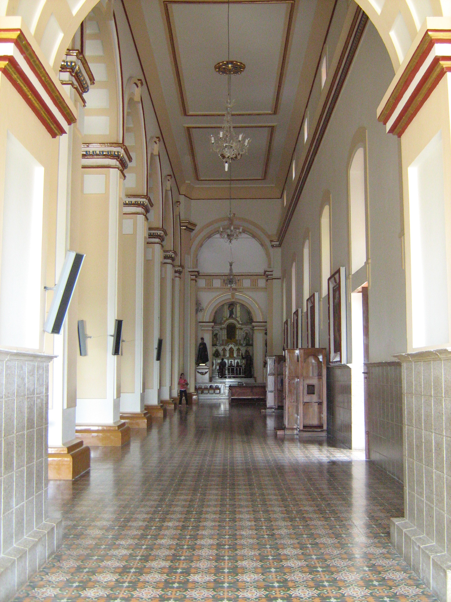 Neve Lateral Derecha de la Basílica de Yarumal. Antioquia, Colombia.